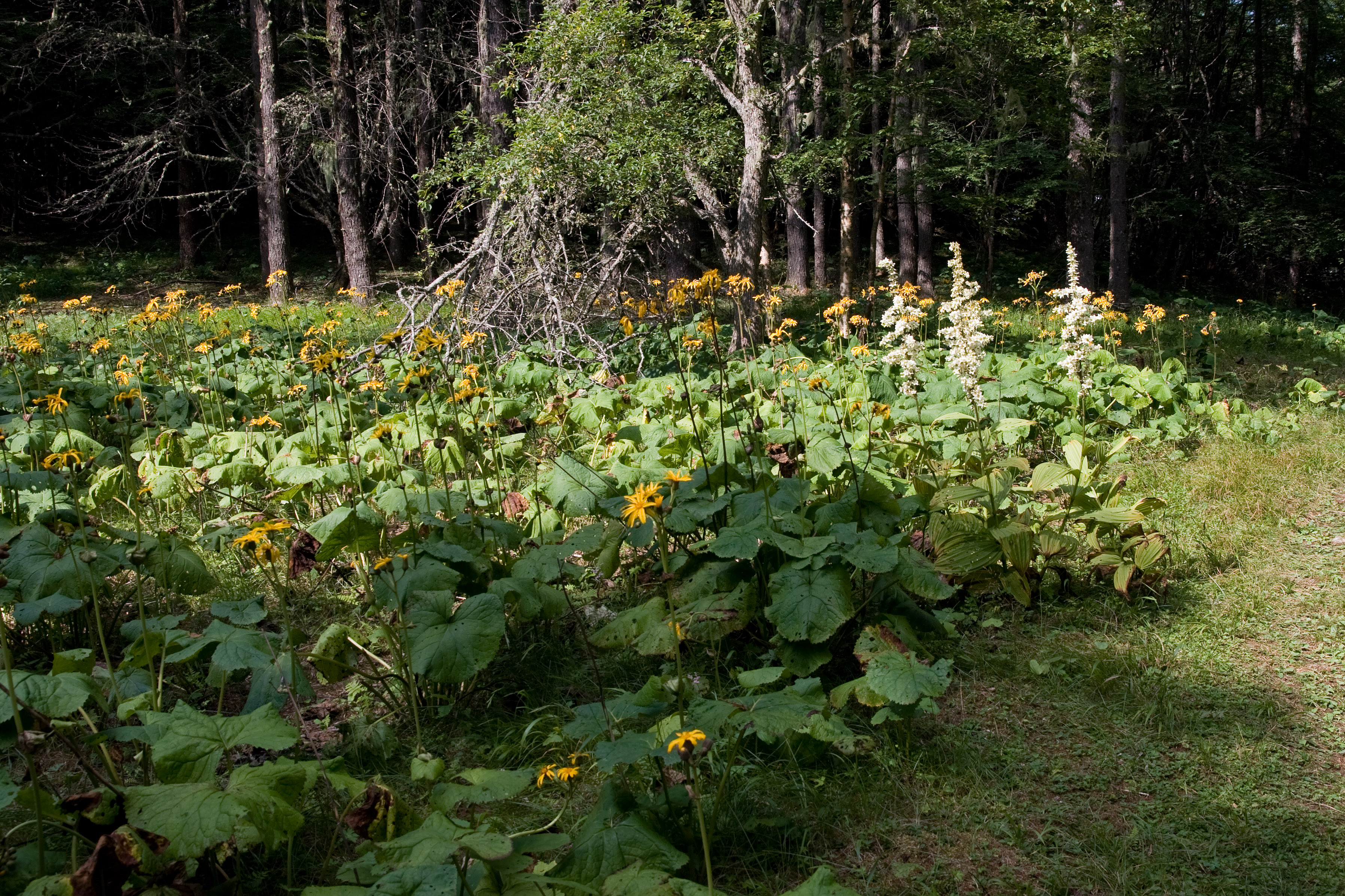 マルバダケブキ (学名:Ligularia dentata)